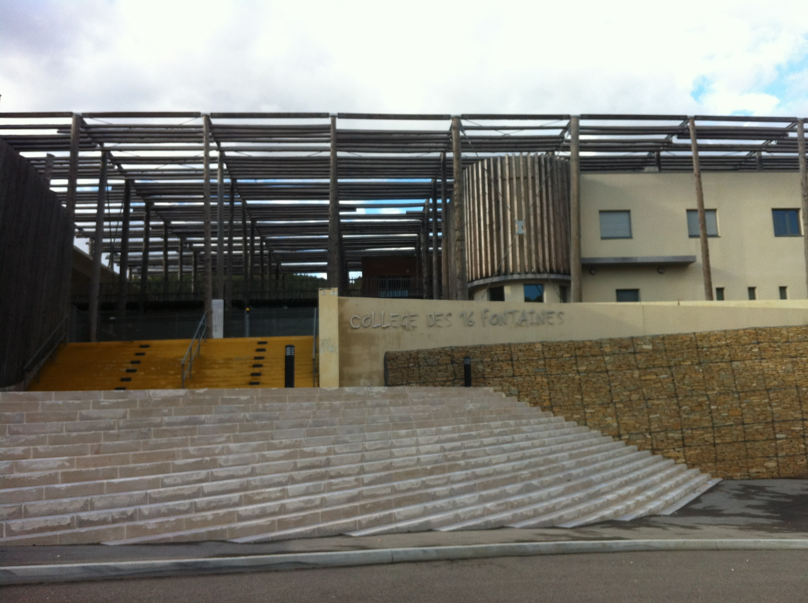 collège